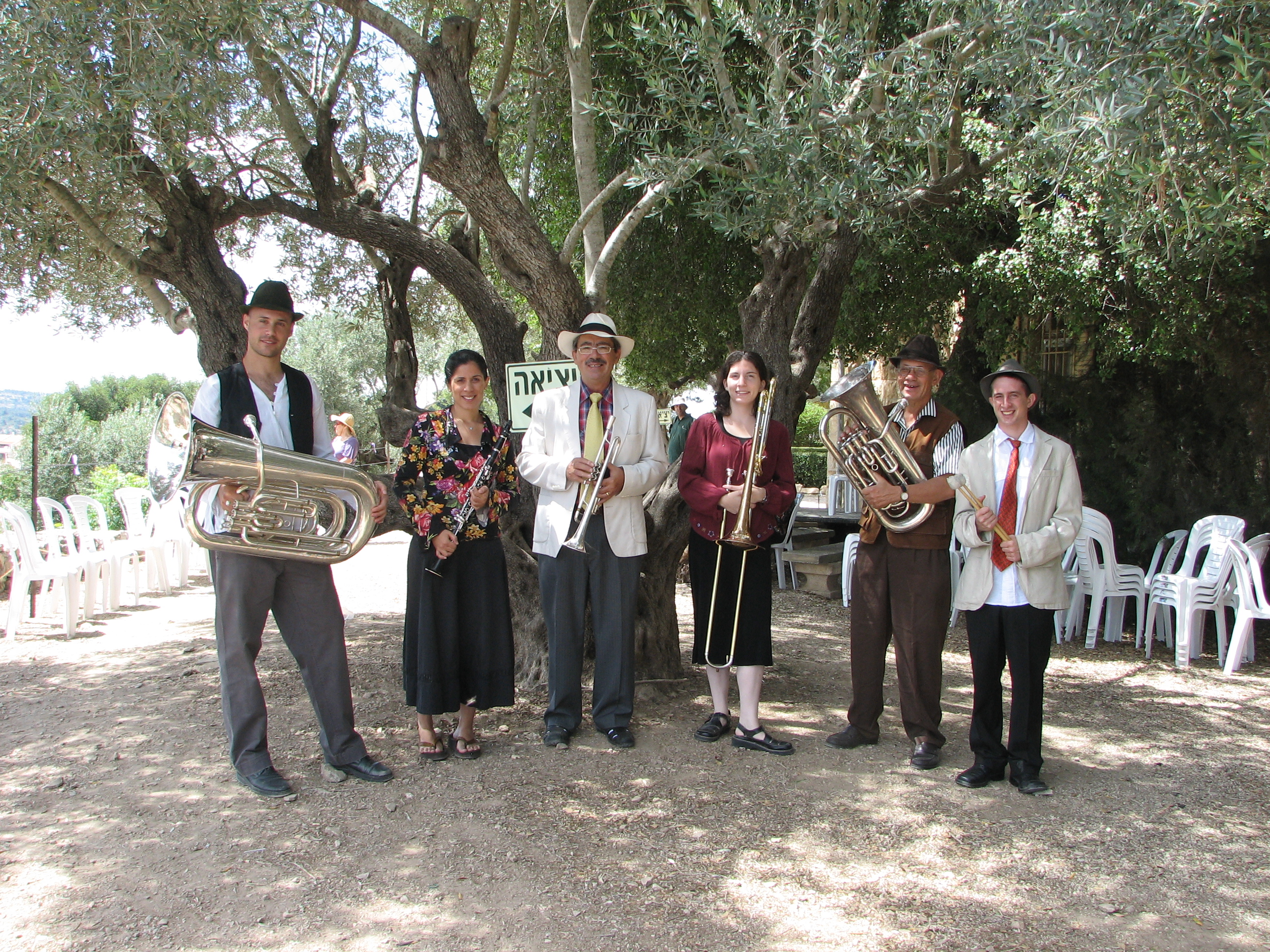 The Abu Ghosh Music Festival is held twice a year, in the fall and late spring, with musical ensembles and choirs from Israel and abroad performing in and around the churches in Abu Ghosh פסטיבל אבו גוש הוא פסטיבל מוזיקה ווקאלית, המתקיים כיום בסוכות ובשבועות, בכנסיית גבירתנו של ארון הברית ובכנסיות של המנזר הבנדיקטיני הרכב כלי נשיפה בסגנון בלקני המלווה את זמרי א-קפלה ירושלים במופע הקסם הבולגרי הסרבי והצ'כי